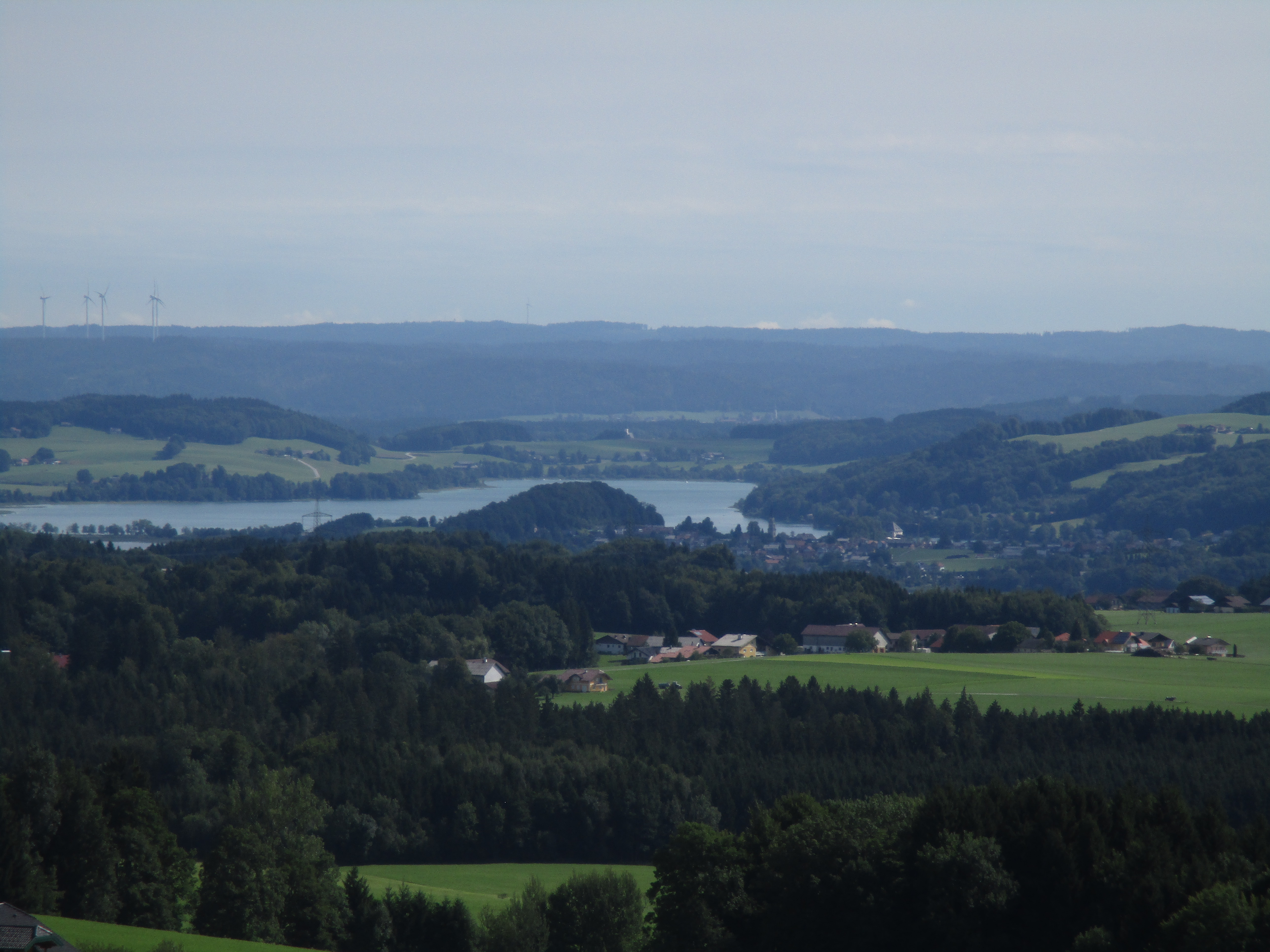 Aussicht von der Kaiserbuche aus, links im Bild der Mattsee/Niedertrumersee mit angrenzender gleichnamiger Siedlung